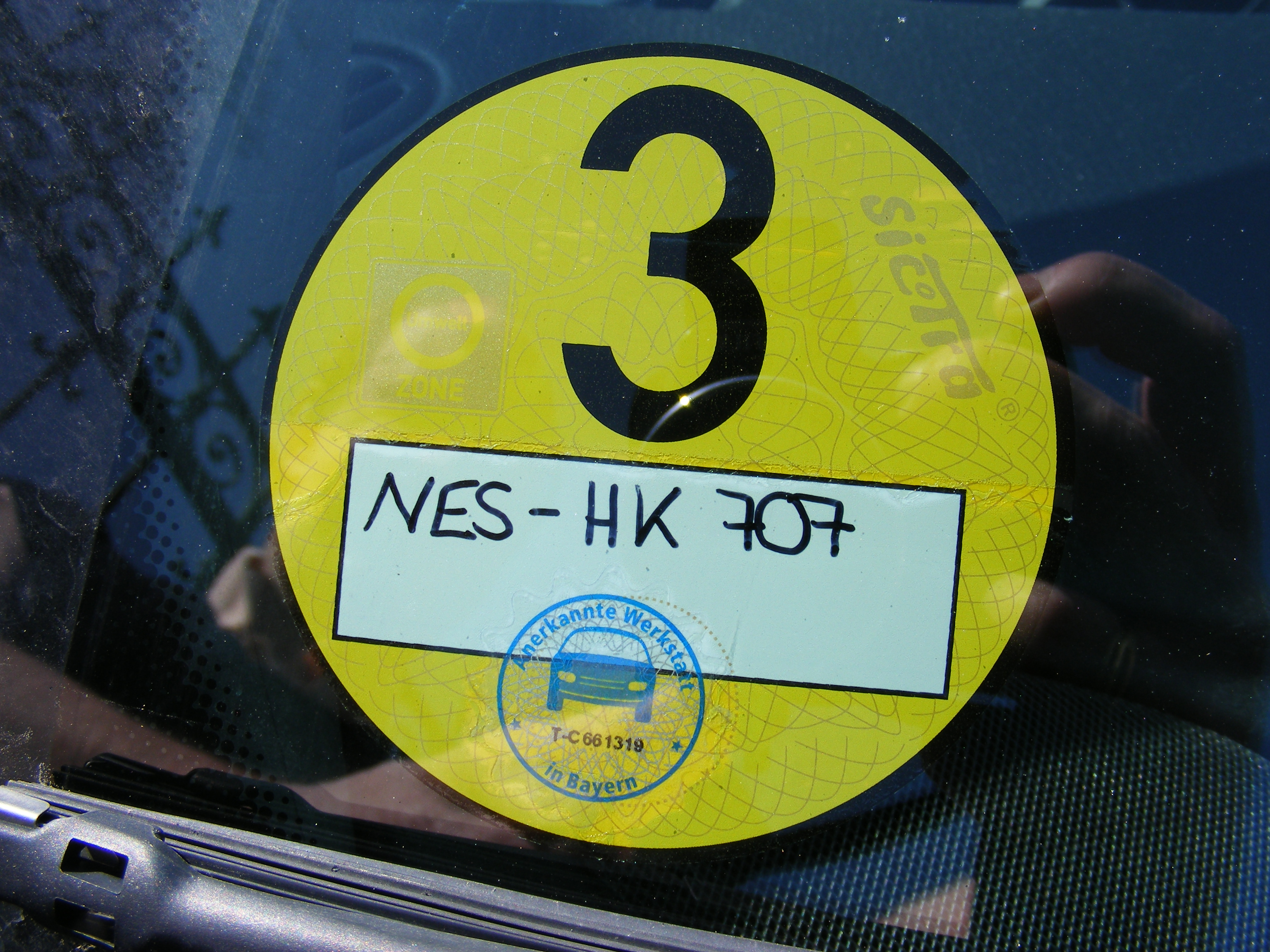 Feinstaubplakette, gelb (Gruppe 3), Aussteller: "anerkannte Werkstatt in Bayern"